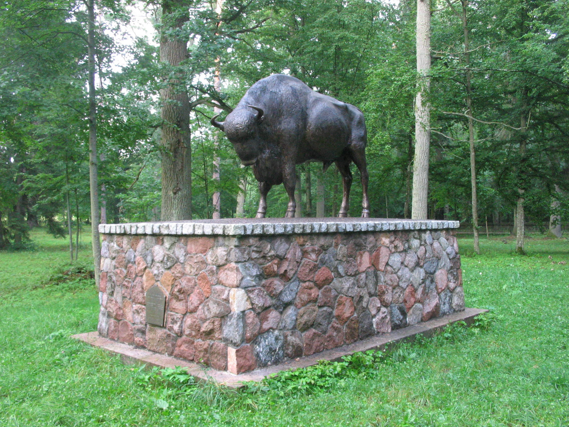 pomnik żubra w Zwierzyńcu (gmina Białowieża)